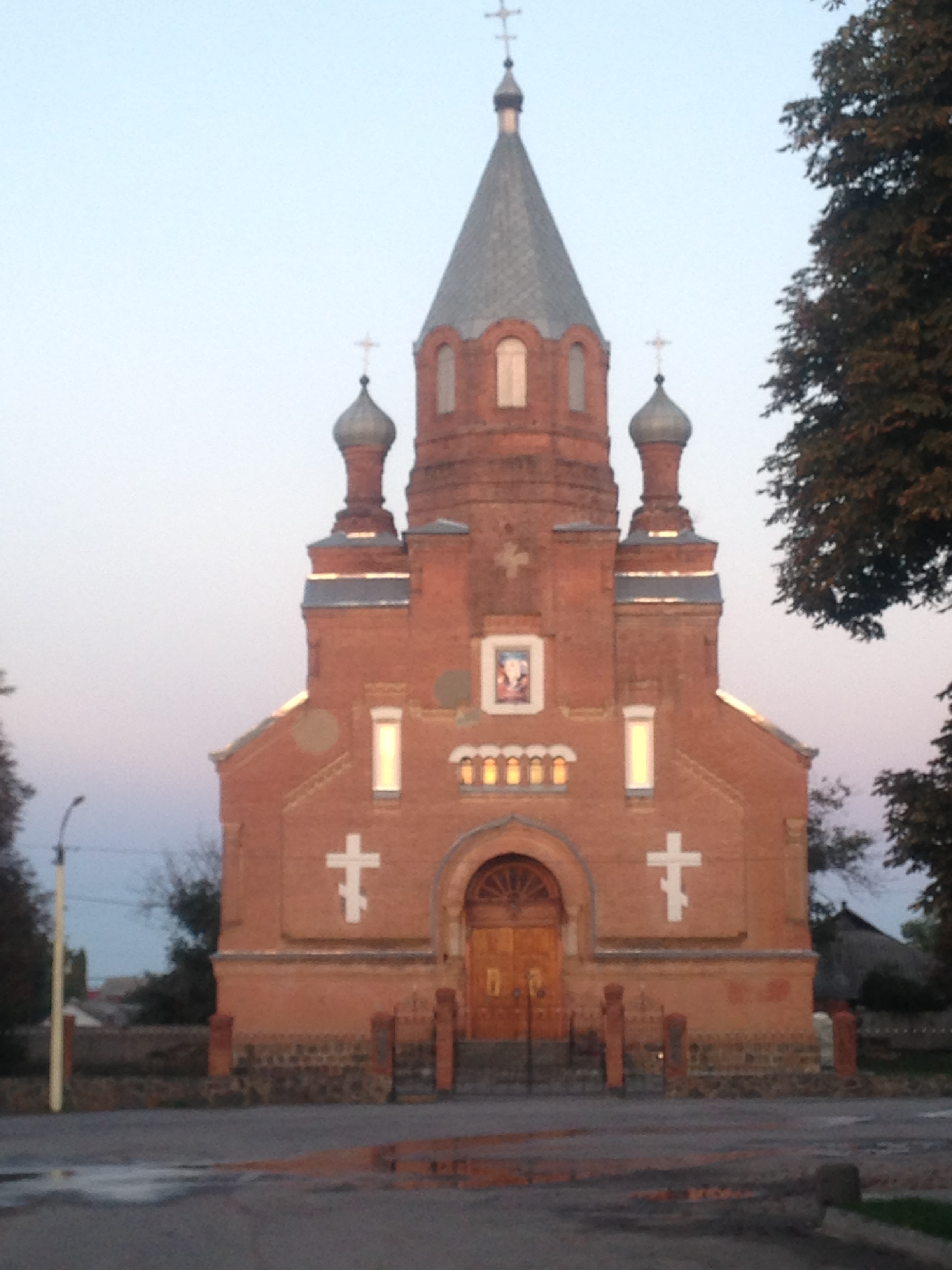 Собор Св.Вшестя, Іллінецький район, м. Іллінці, вул. Леніна,11